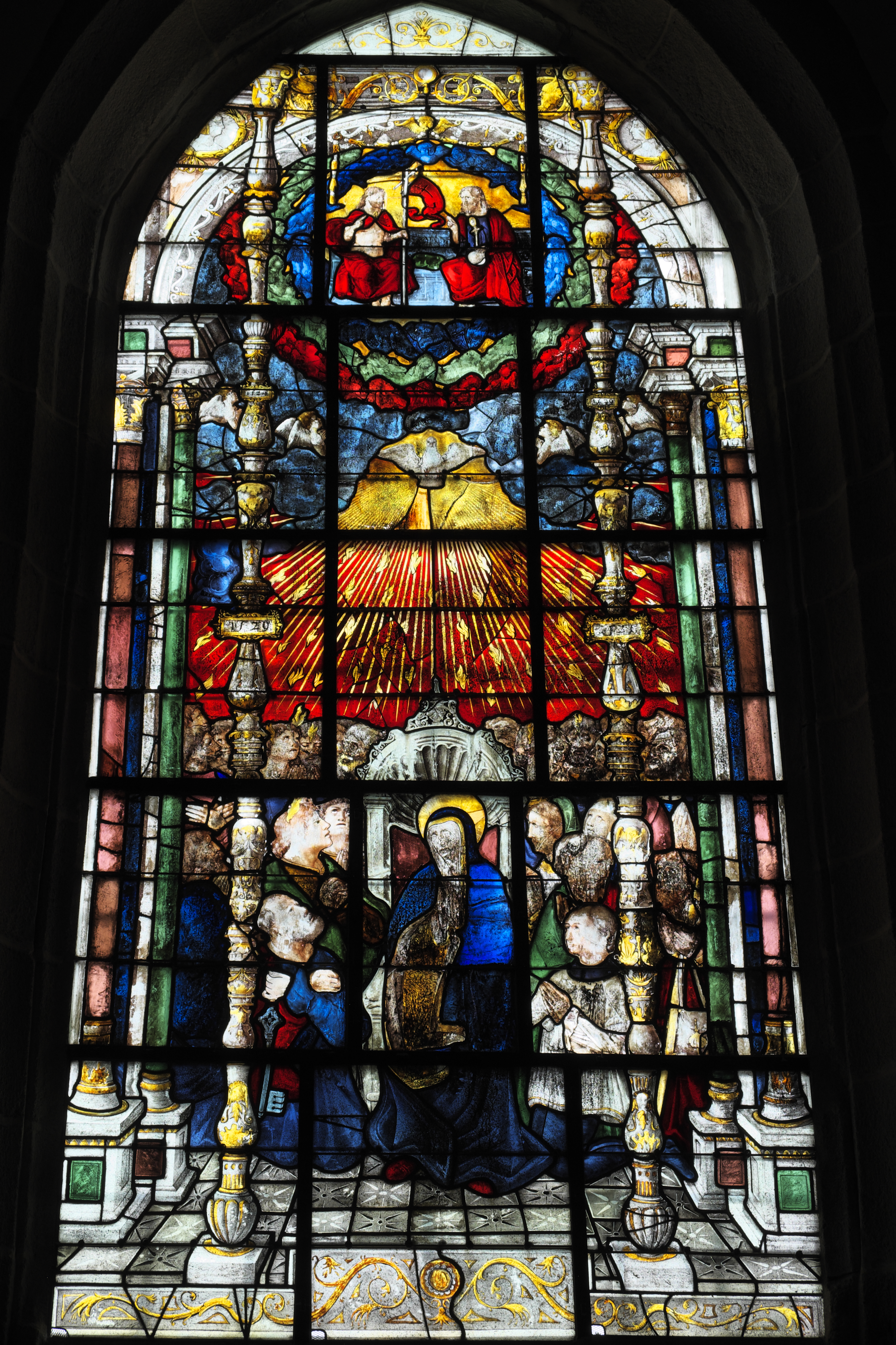 Pfingstfenster (Baie 8) in der Kirche Sainte-Marie-Madeleine, der ehemaligen Stiftskirche Notre-Dame, in Champeaux im Département Ille-et-Vilaine (Region Bretagne/Frankreich), Bleiglasfenster mit der Jahreszahl 1529; Darstellung: Aussendung des Heiligen Geistes (Mitte), Gottvater und Jesus Christus (oben), Maria mit Petrus und Stifter Jean Masure (unten)